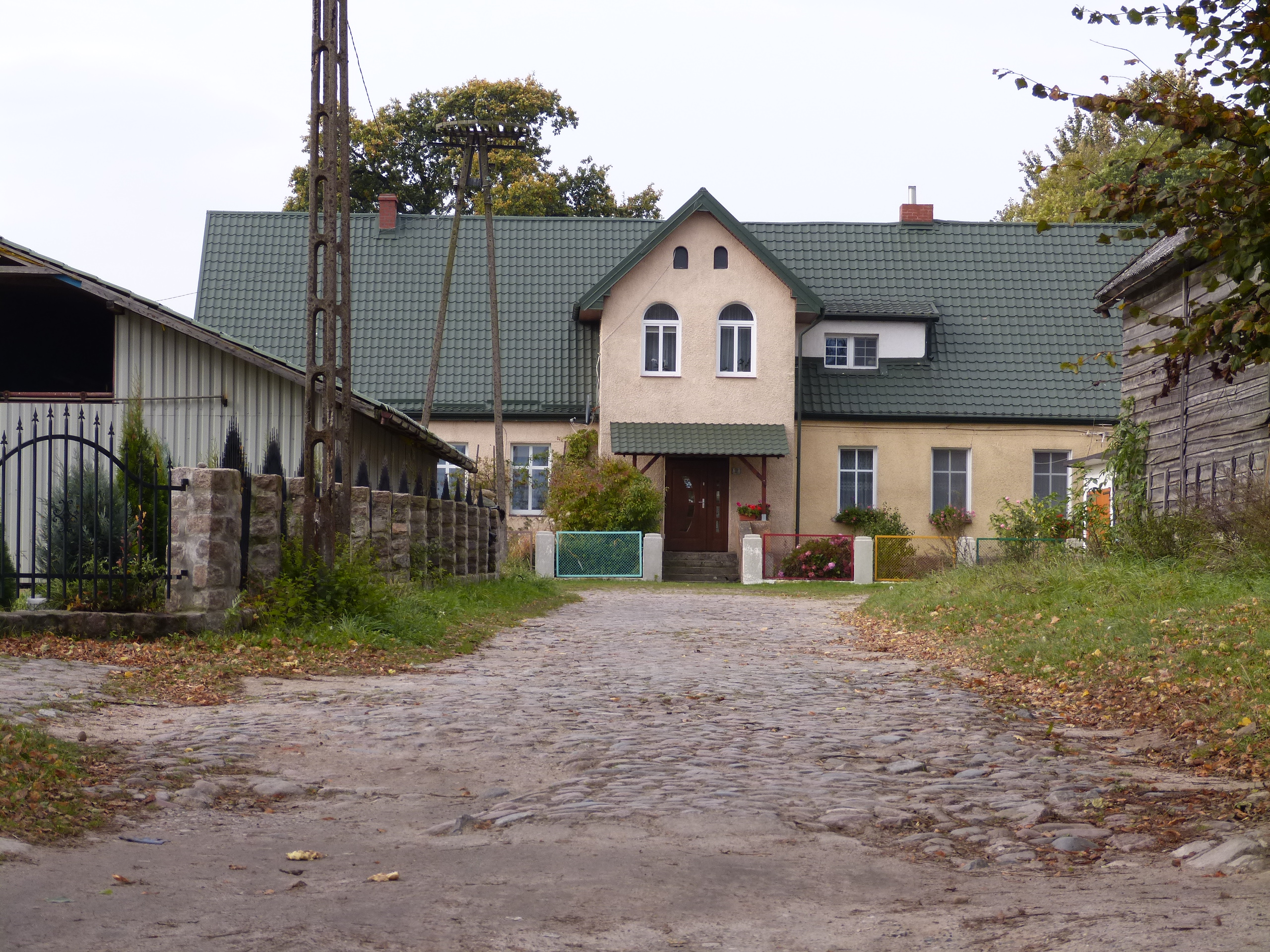 Ehemaliges Guthaus, Gut A, Gervin